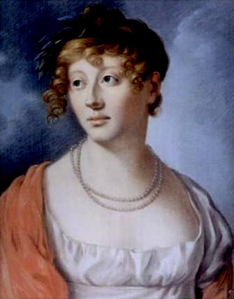 J. W. C. Roux - Caroline Jagemann: Rollenportrait als Ion. Brustbild gegen rechts.